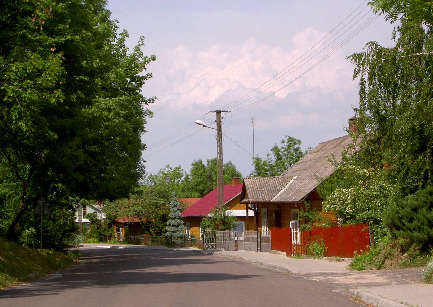 Horodło, Poland • Ulica / Street